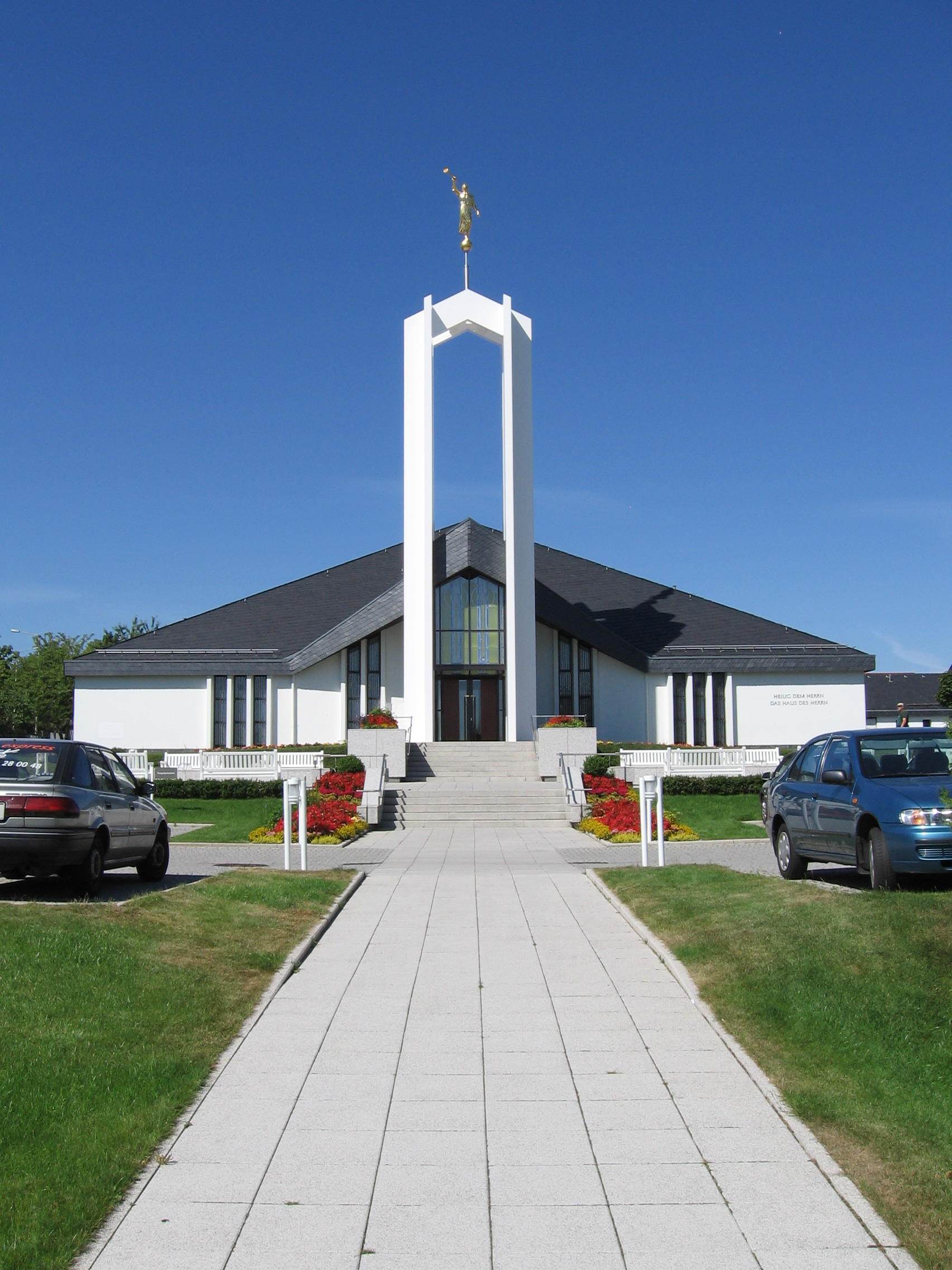 Temple in Freiberg, Germany